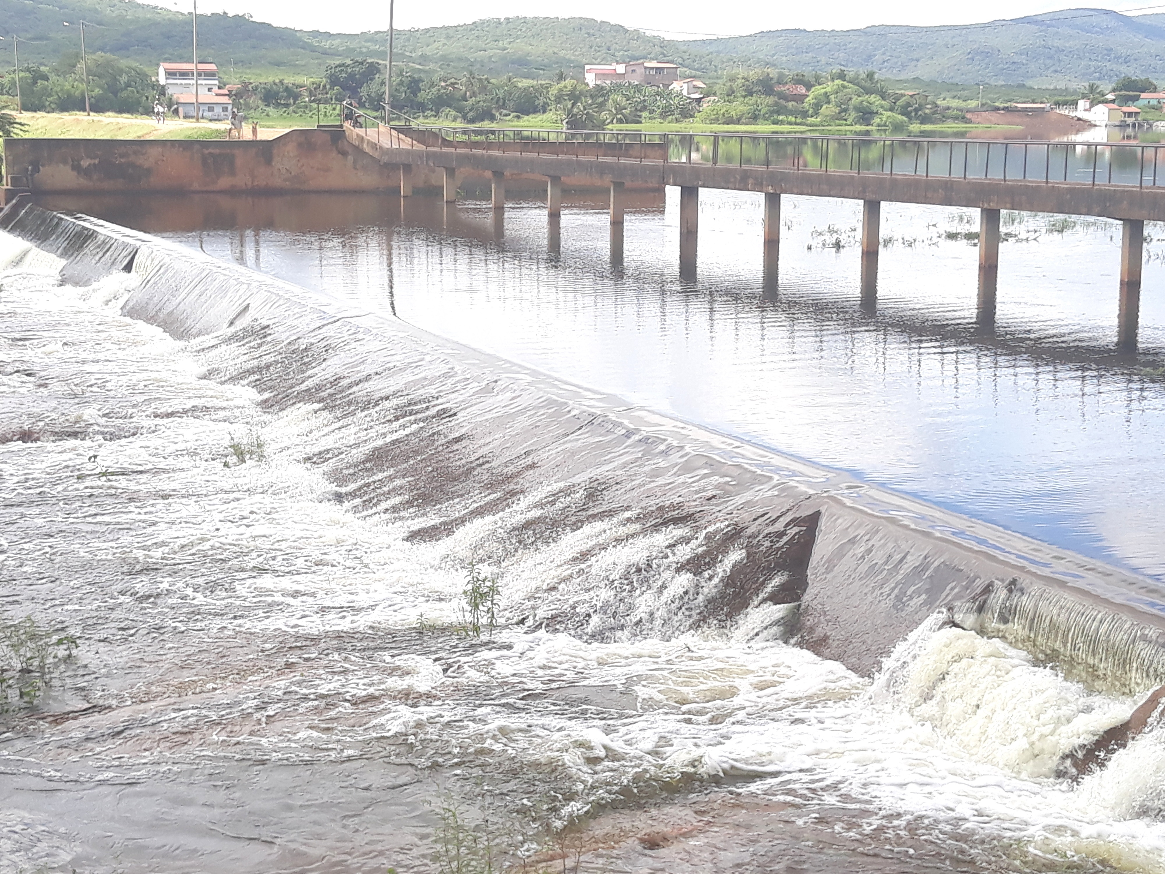 Sangria do Açude São Gonçalo, no município do Encanto, Rio Grande do Norte, Brasil